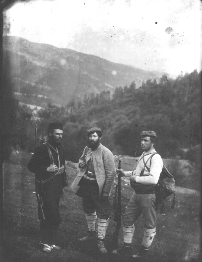 Petar Angelov Krastyo Bulgariata and Nikola Zhekov